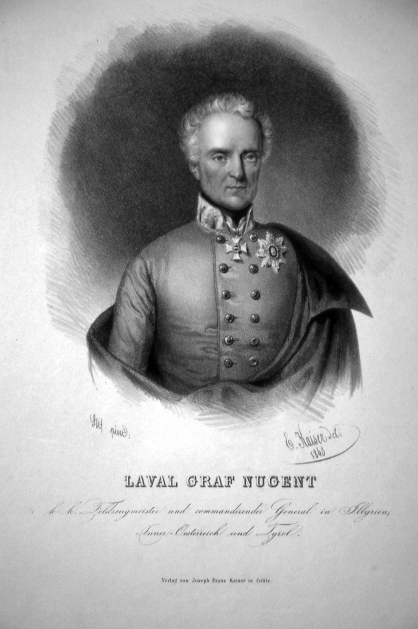 Laval Graf Nugent (1777-1862)